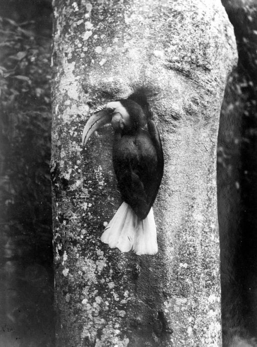 Repronegatief. Jaarvogel (Rhytidoceros undulatus)